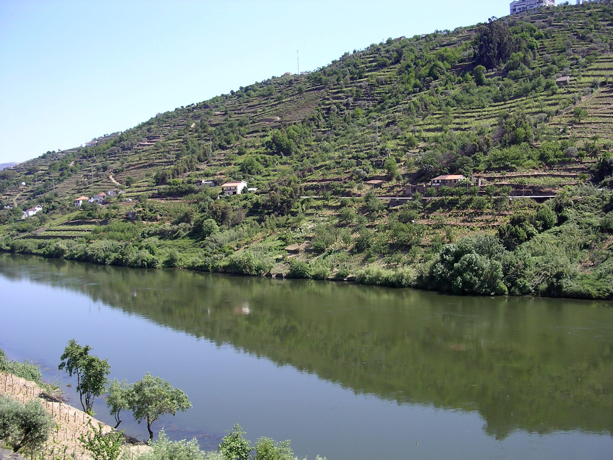 Douro river